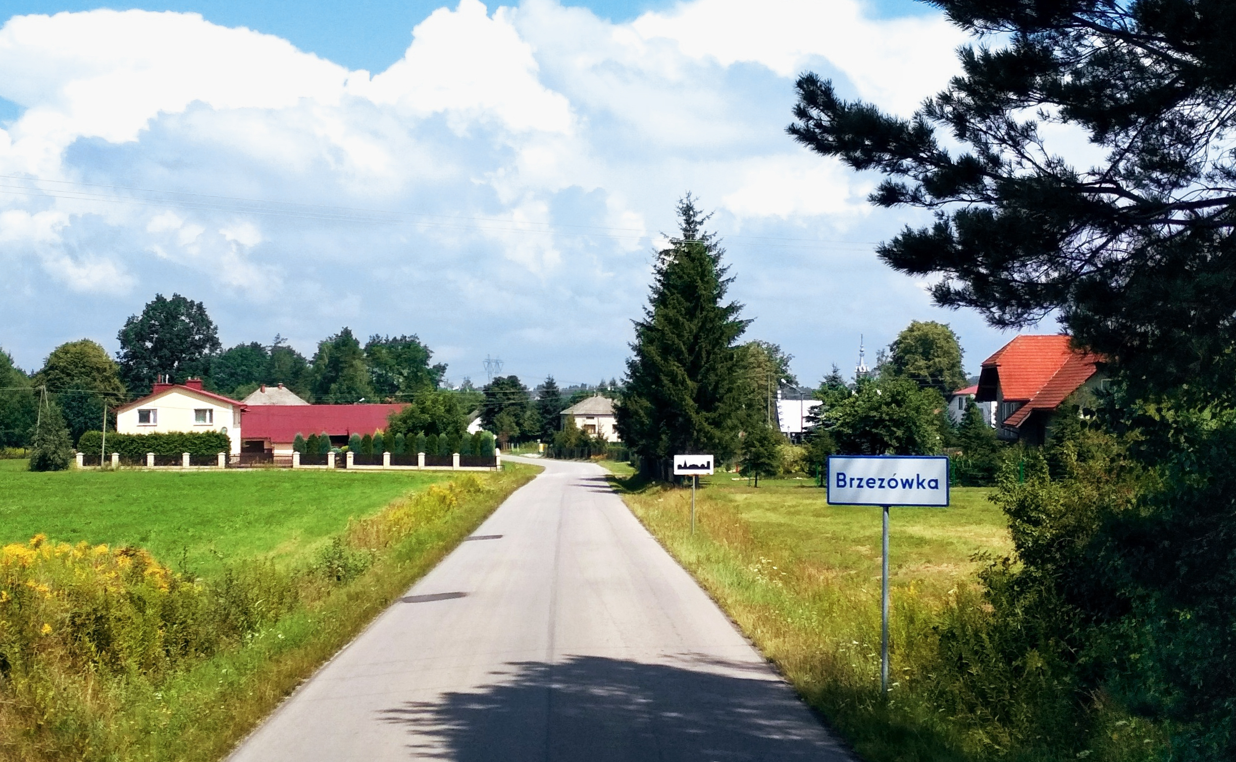 BRZEZÓWKA (gmina Kolbuszowa, sołectwo Domatków)wjazd do wsi od strony Przedborza.